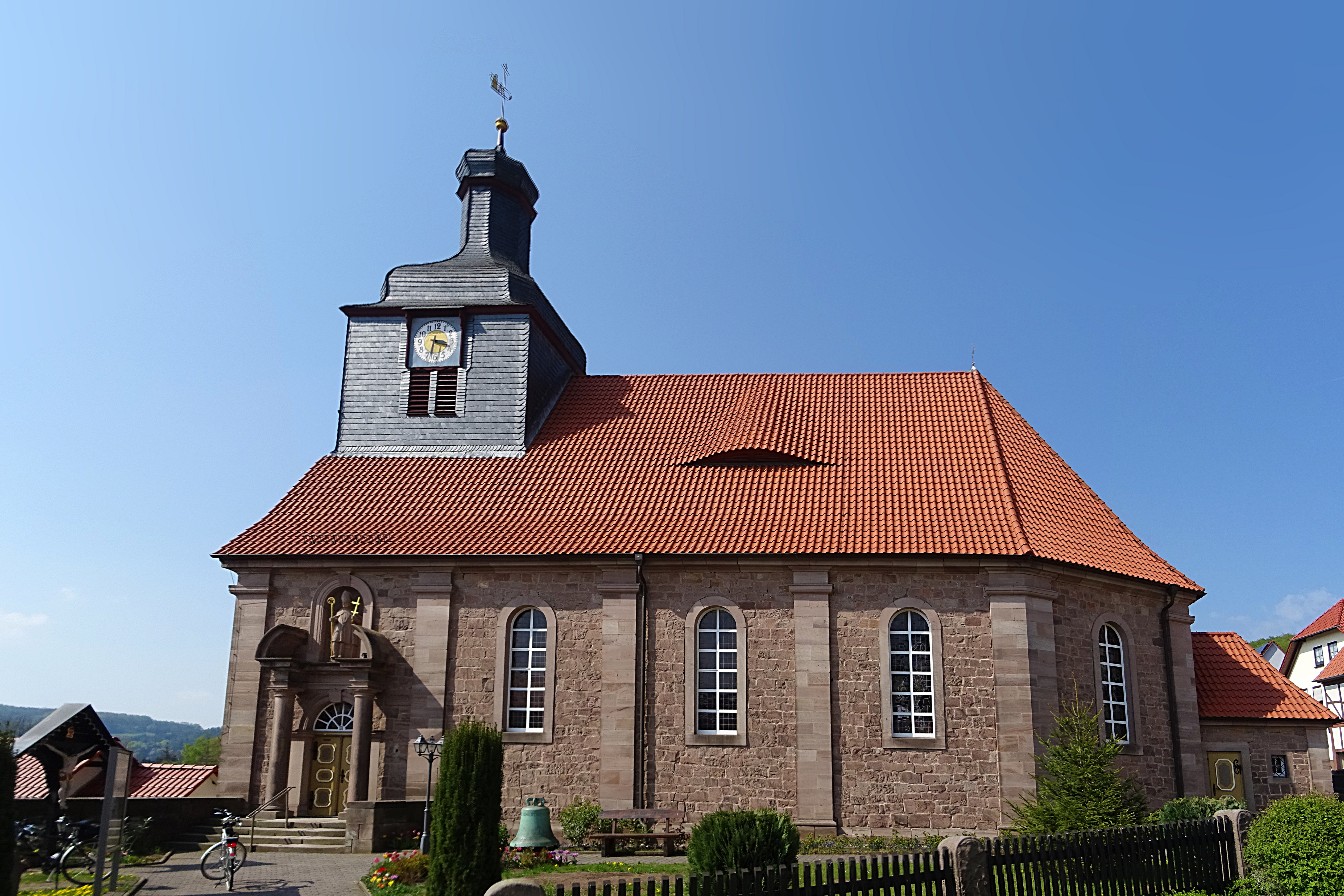 die Bonifatiuskirche in Wüstheuterode von Süden